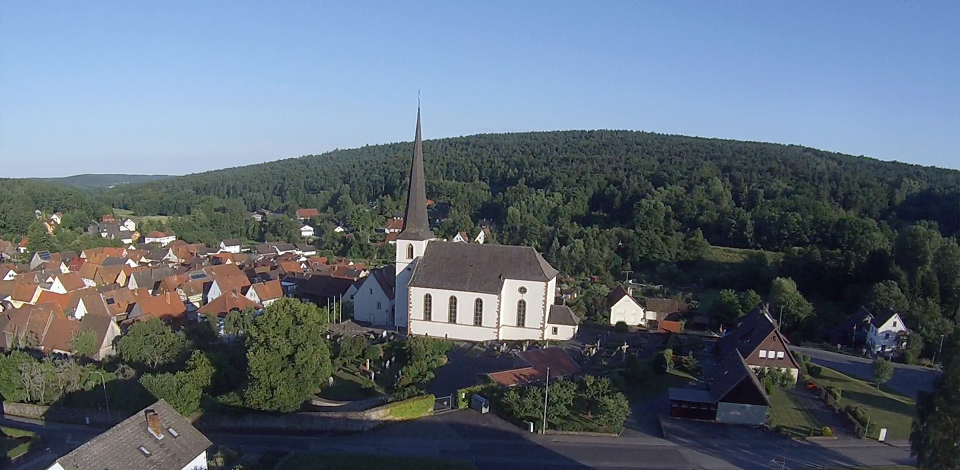 ehem. Chorturmkirche, heute Saalbau mit eingezogenem Westchor und Ostturm mit Spitzhelm, im 1615-17 nachgotisch erneuerten Turm das tonnengewölbte mittelalterliche Chorturmerdgeschoss erhalten, Langhaus mit Satteldach und Chor mit Walmdach 1810; mit Ausstattung This is a photograph of an architectural monument.